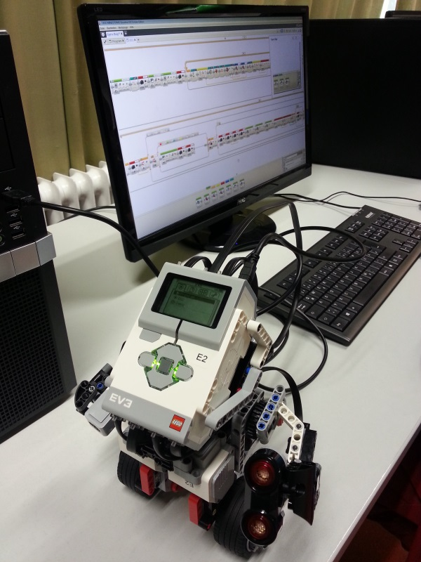 Tag 6: Gyro Boy Programm